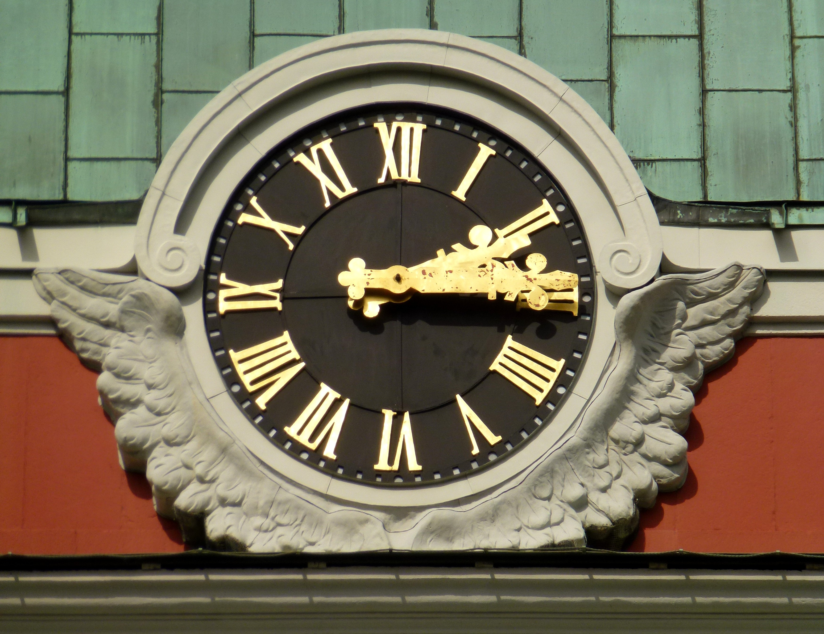 Sankt Jacobs kyrkas tornur